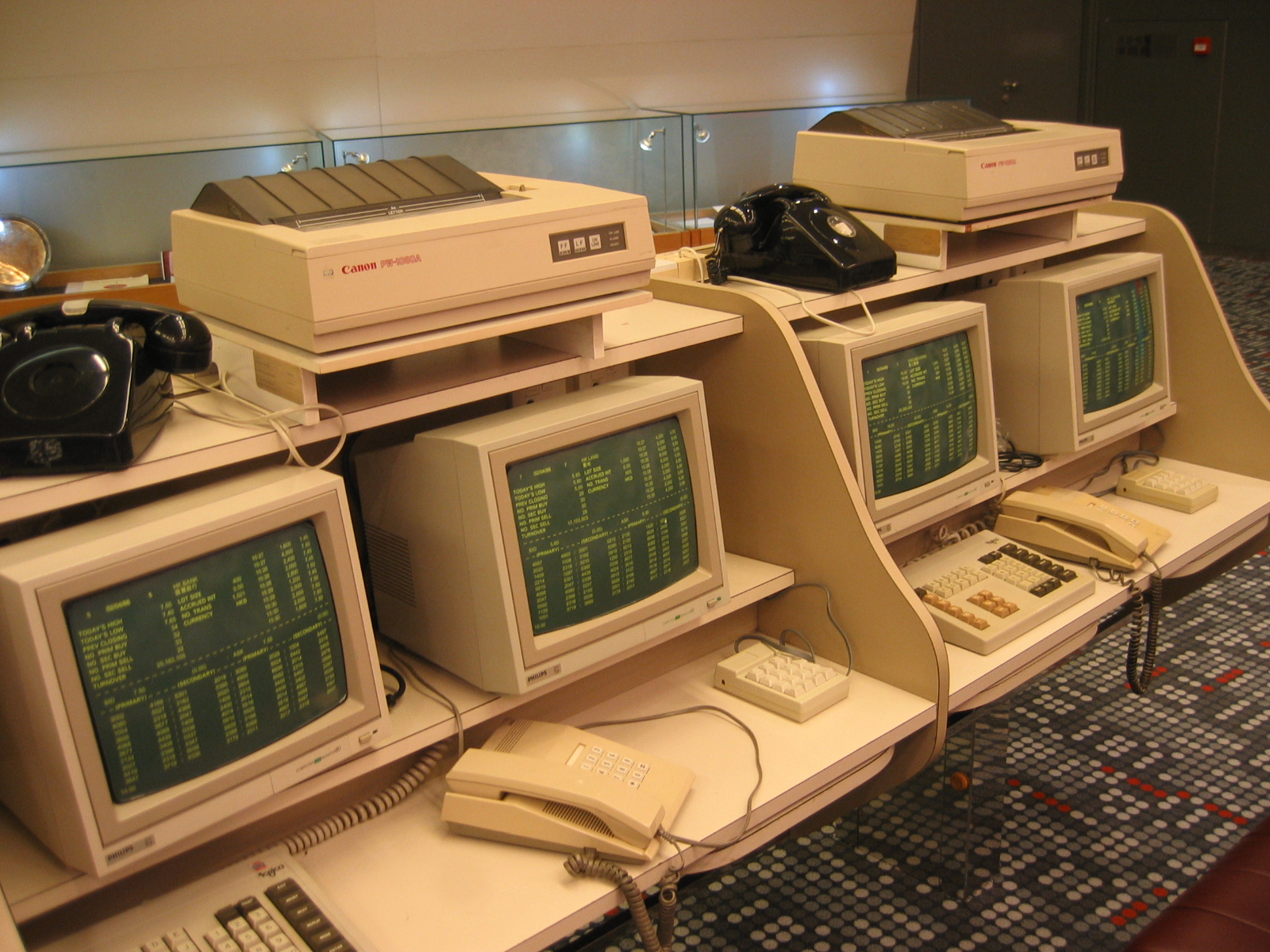 昔日交易大堂所使用的交易櫃檯